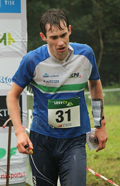 Tomáš Kubelka na MČR klasika 2017